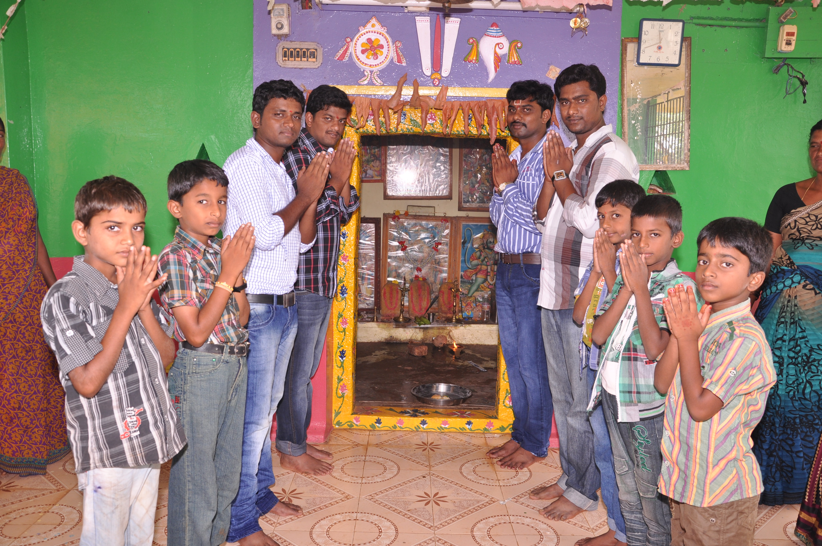 PHTOS